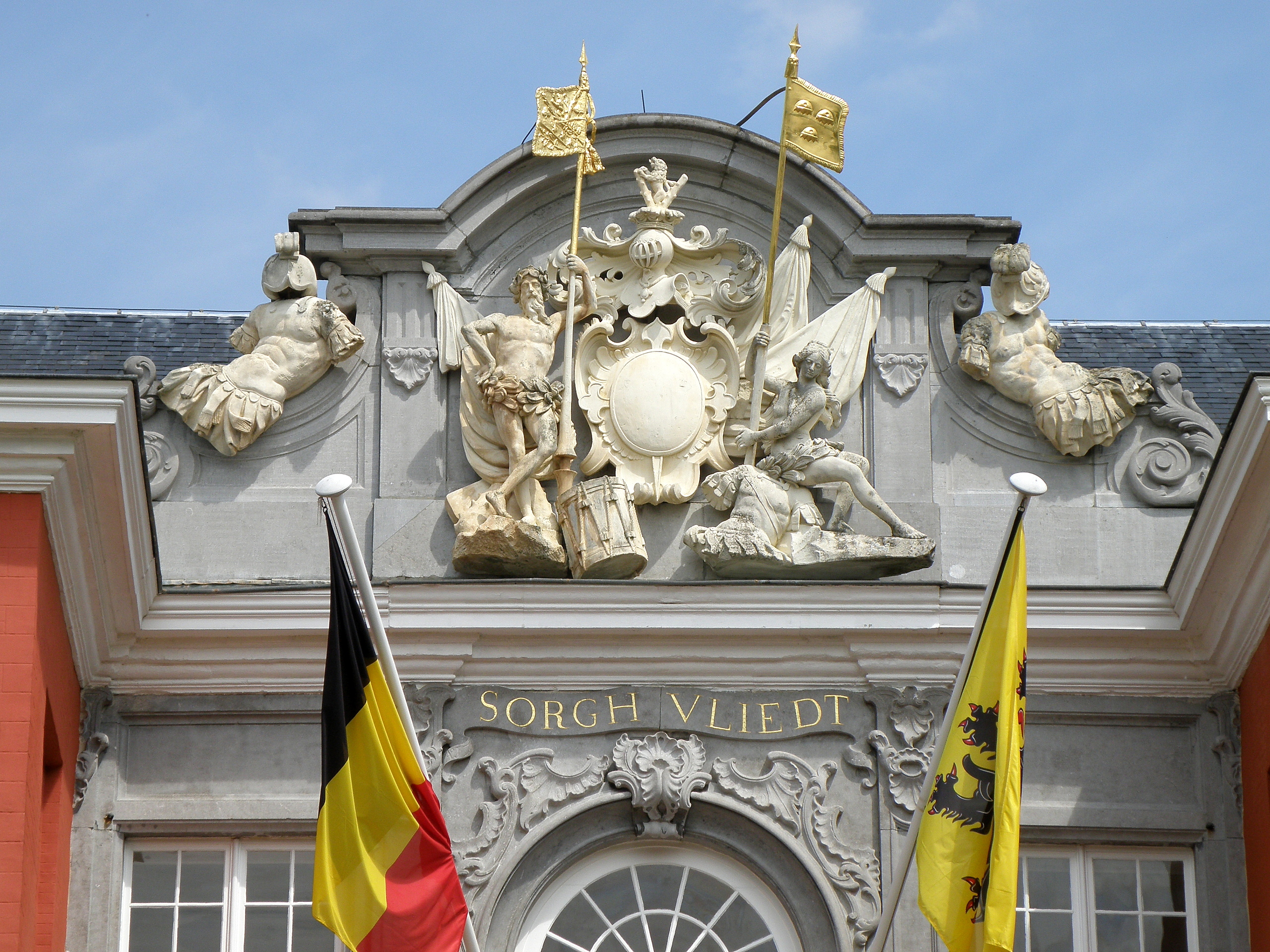 Antwerpen, district Hoboken. Kasteel Sorghvliedt, fronton voorgevel.